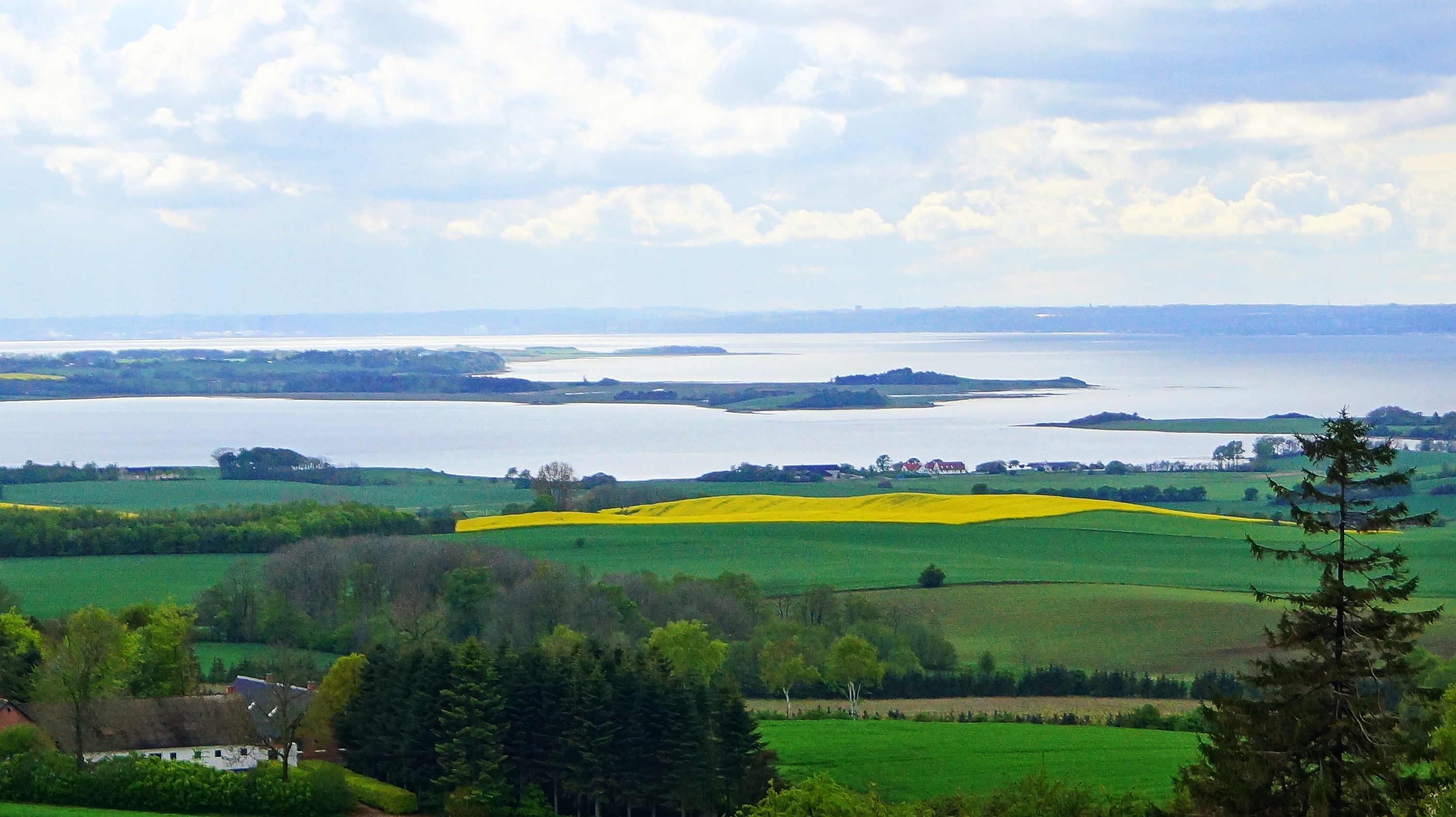 Retning Knebel Vig